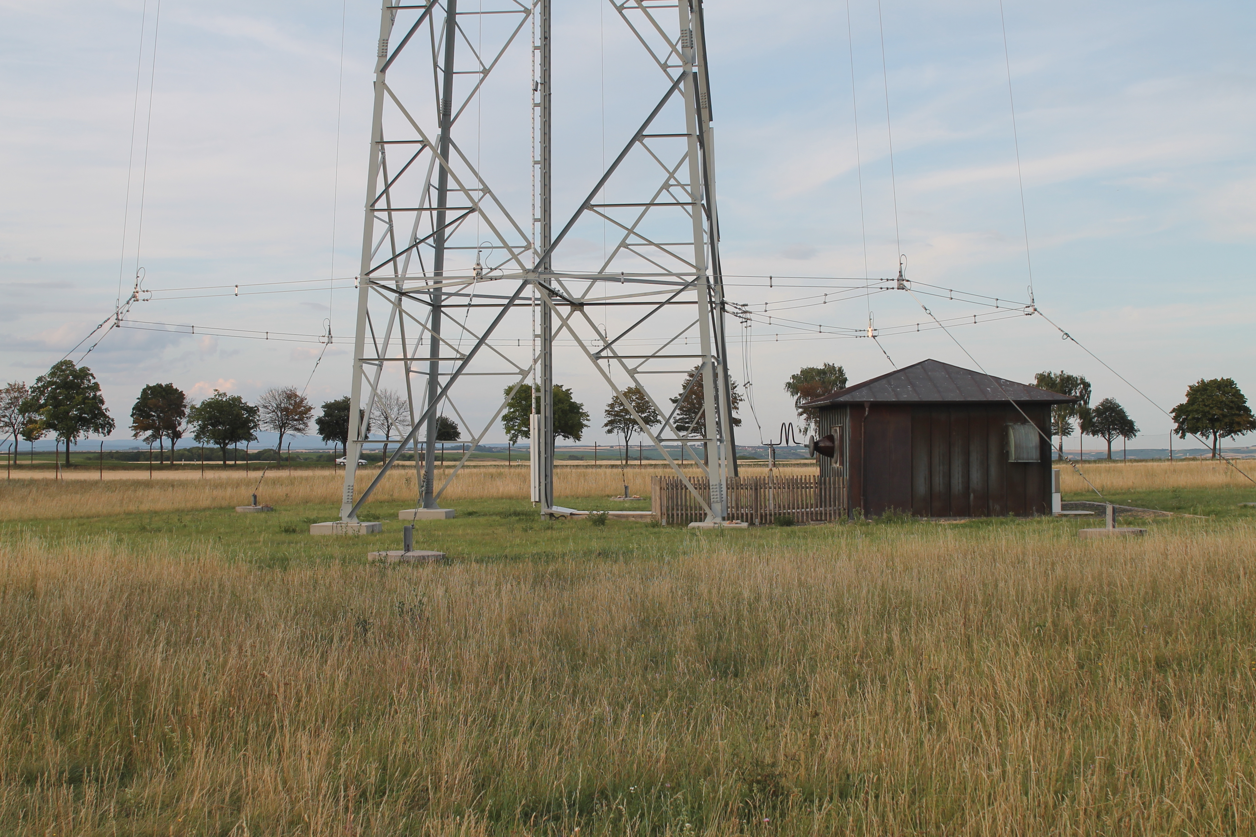 Fuß des Sendeturms des Rheinsenders